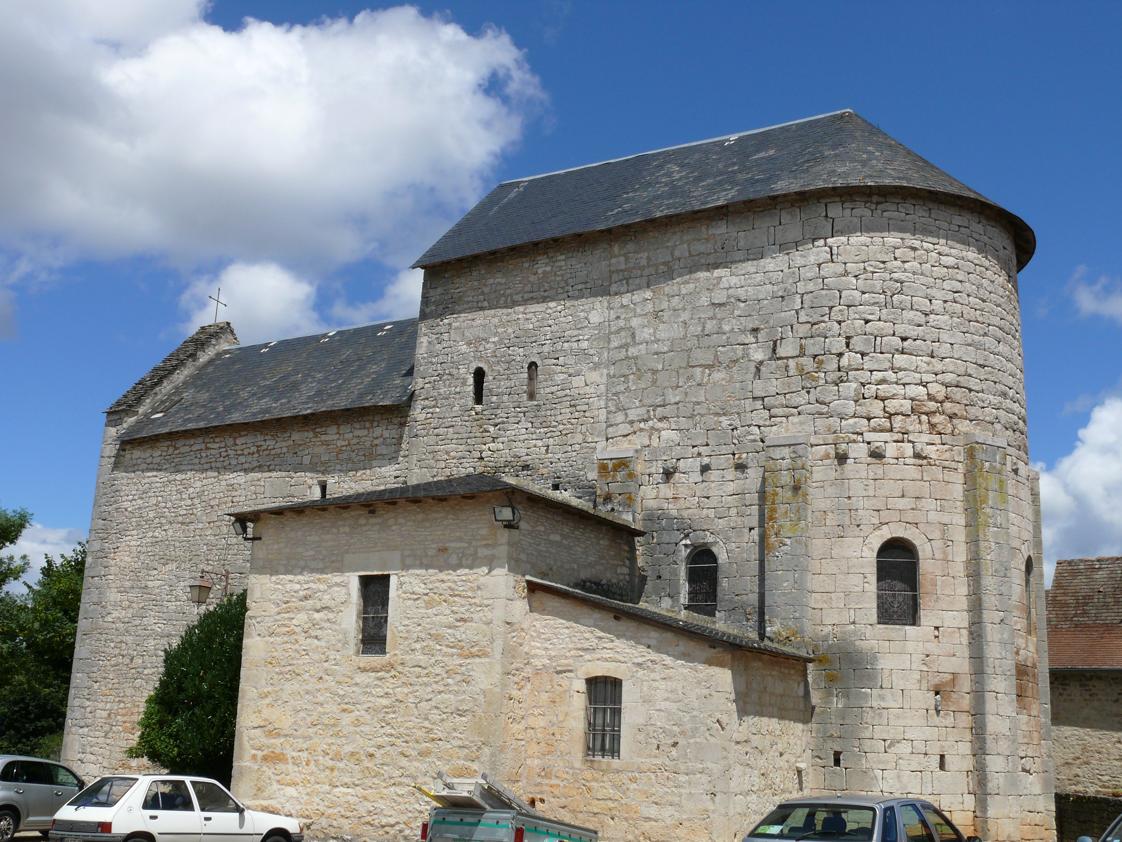 Reilhac - Eglise Saint-Hilaire